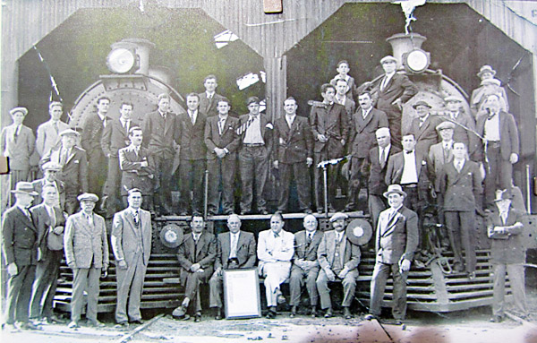 Galpón de máquinas principal en km 5. Se encuetran dos locomotoras y los empleados del lugar